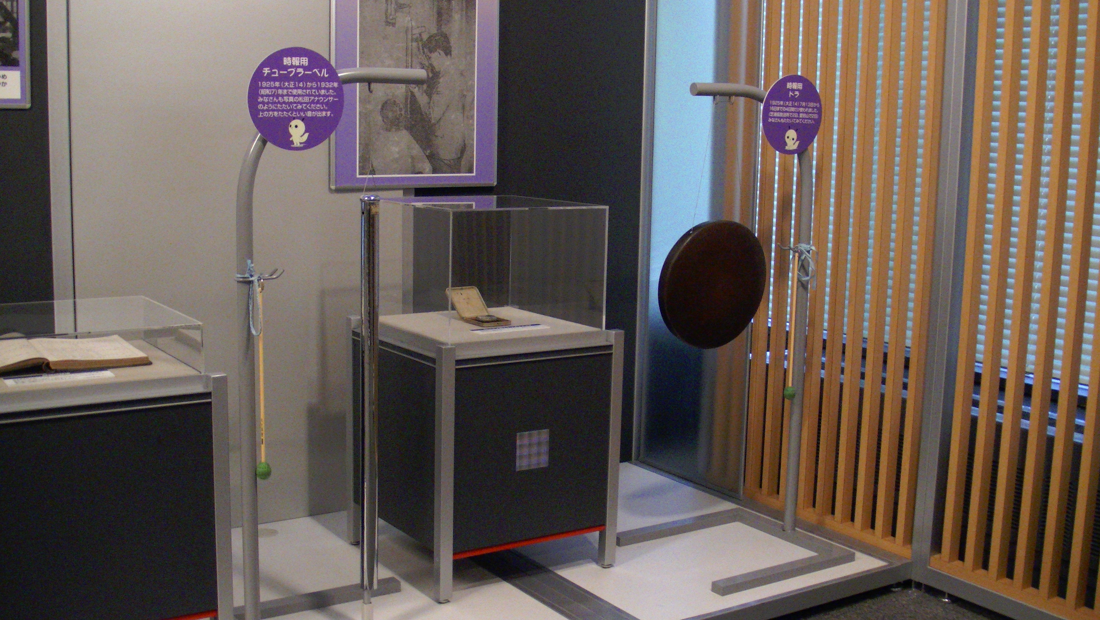 時報用ドラとチューブラベル。NHK放送博物館に常設展示中のもの。